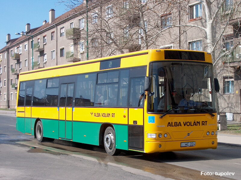 IWE-004 Volvo-Alfa Localo (Dunaújváros) forrás: busztipusok.hu